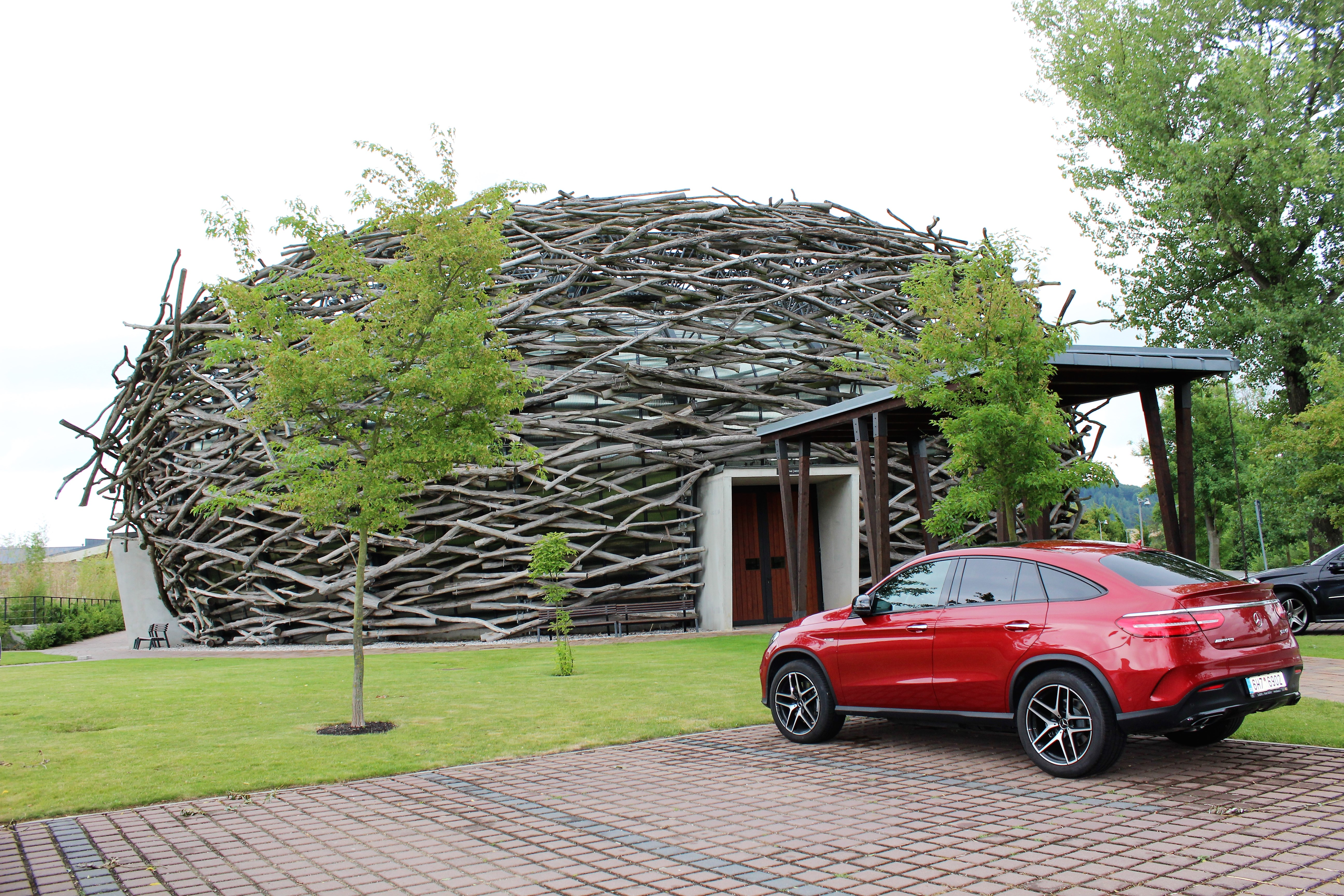 Aréna jízdárny ve tvaru čapího hnízda. Čapí hnízdo na území obce Olbramovice ve Středočeském kraji. Česká republika.